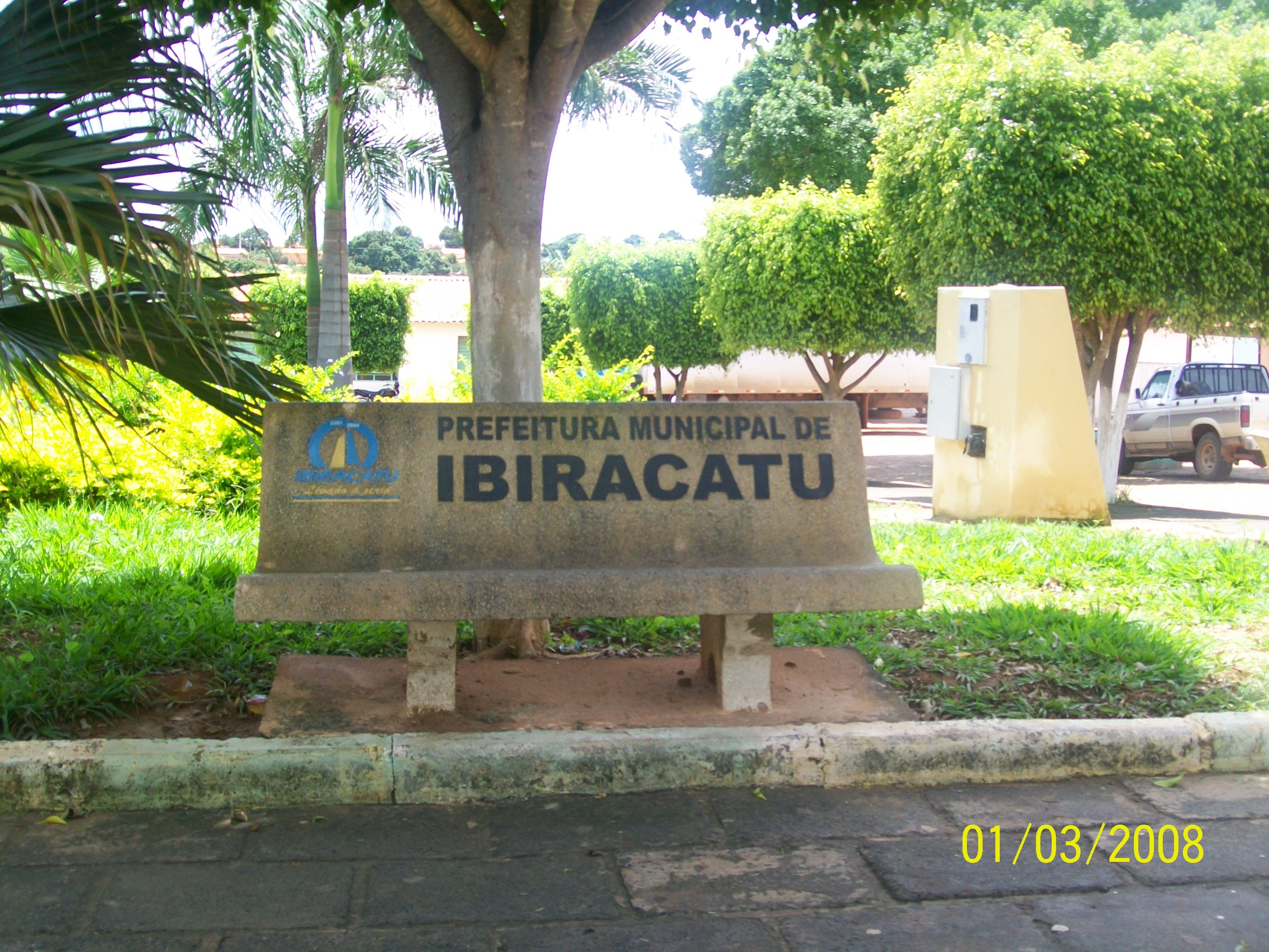 Bando da Praça José Fagundes